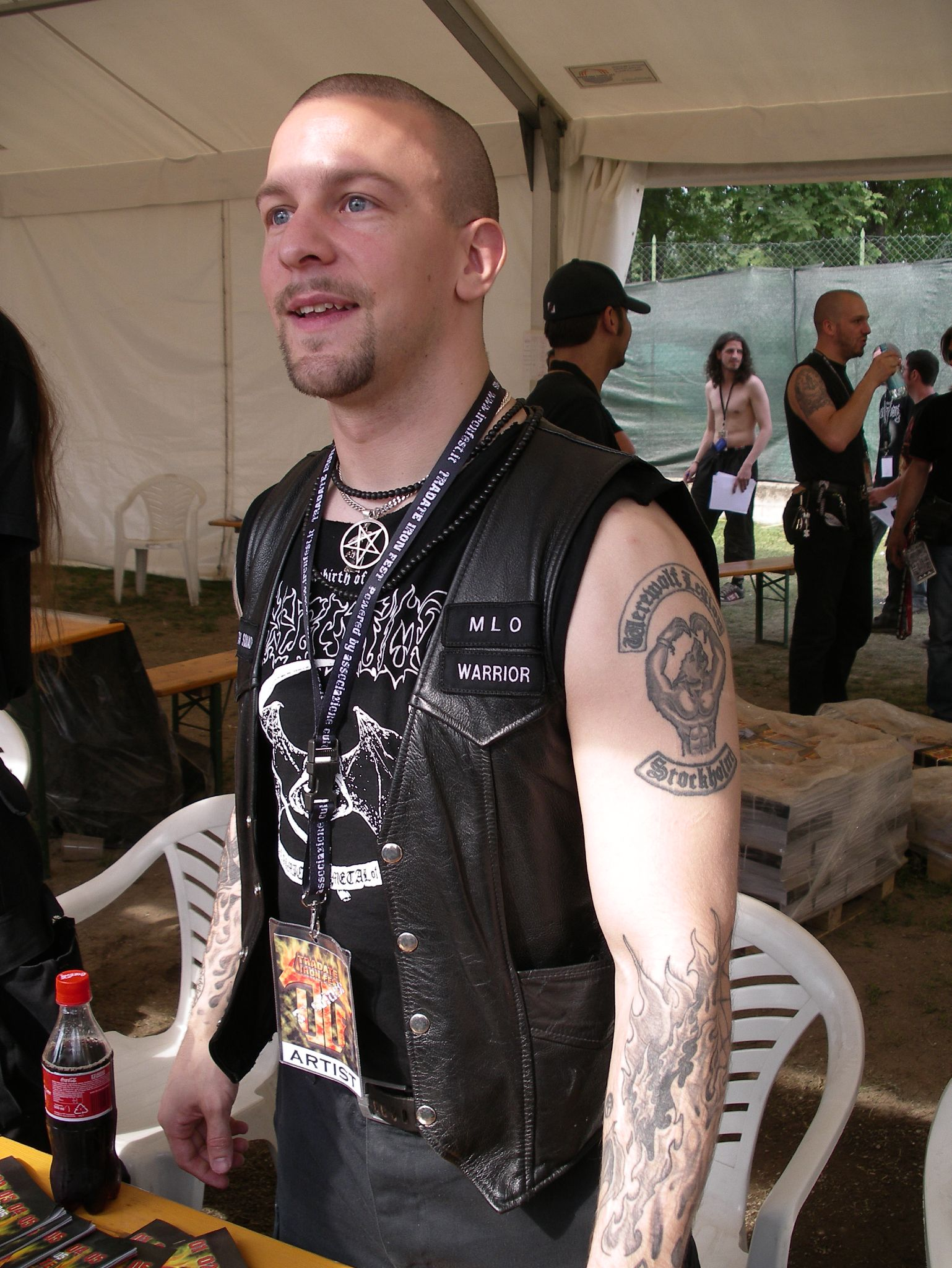 Jon Nödtveidt at a meet and greet in 2005.